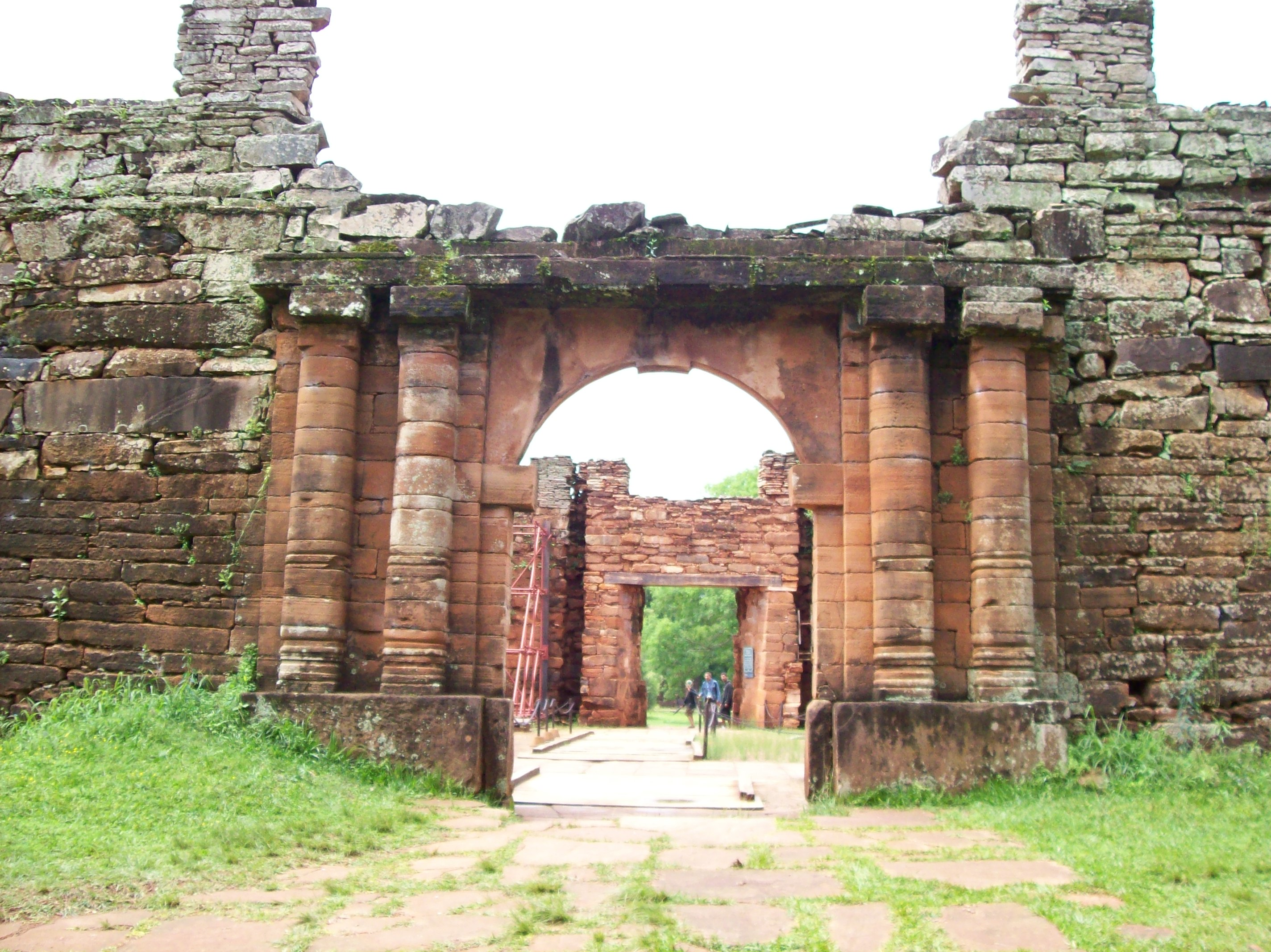 Ruinas de San Ignacio Miní